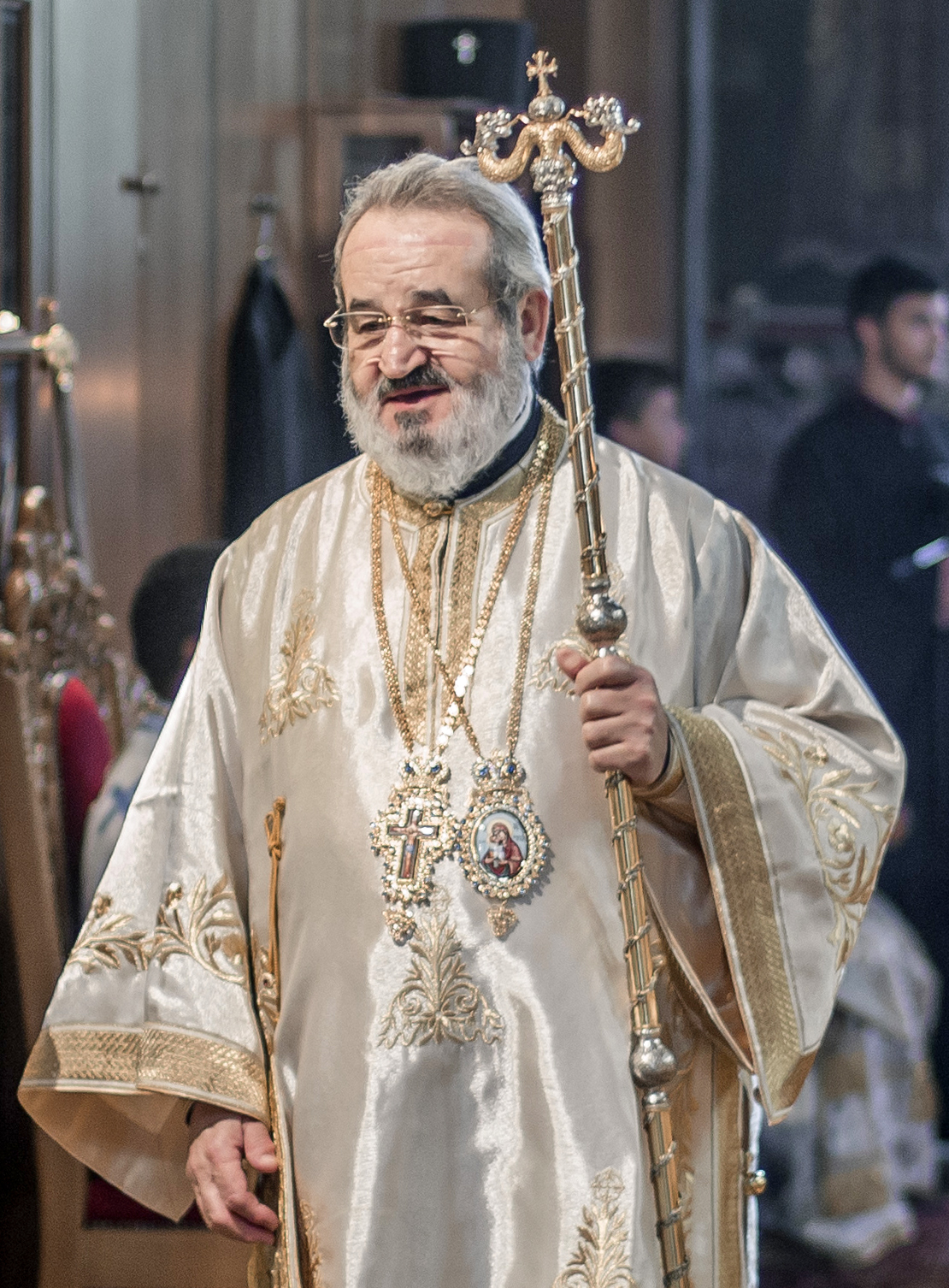 8-9 июня 2016, Поездка в Грецию. Часть 3 / 8-9 June 2016, Trip to Greece. Part 3